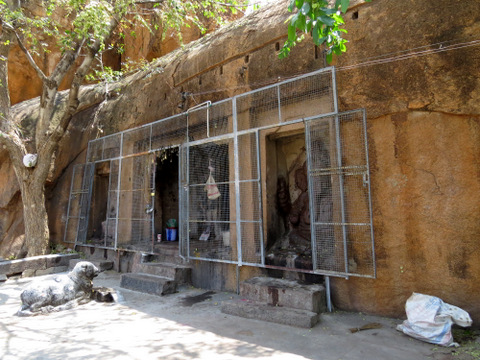 குடவரைக் கோயில் - அரிட்டாப்பட்டி